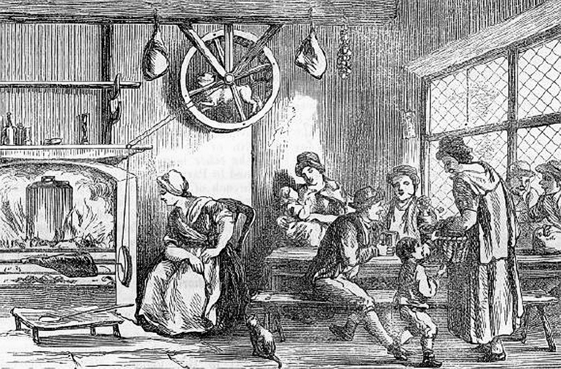 Turnspit dog working